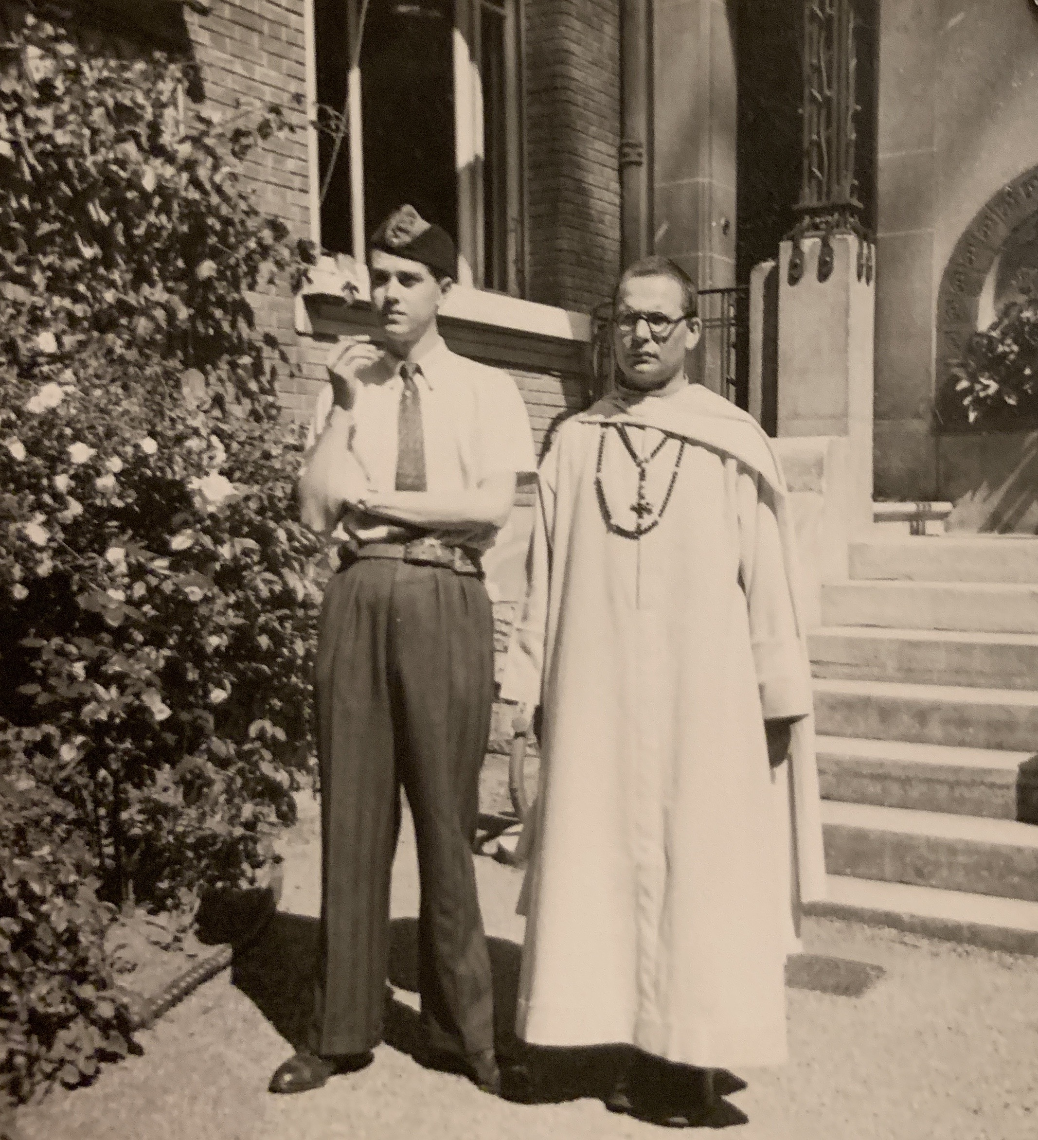 Jacques Dognin et le Père Leloir après la Libération